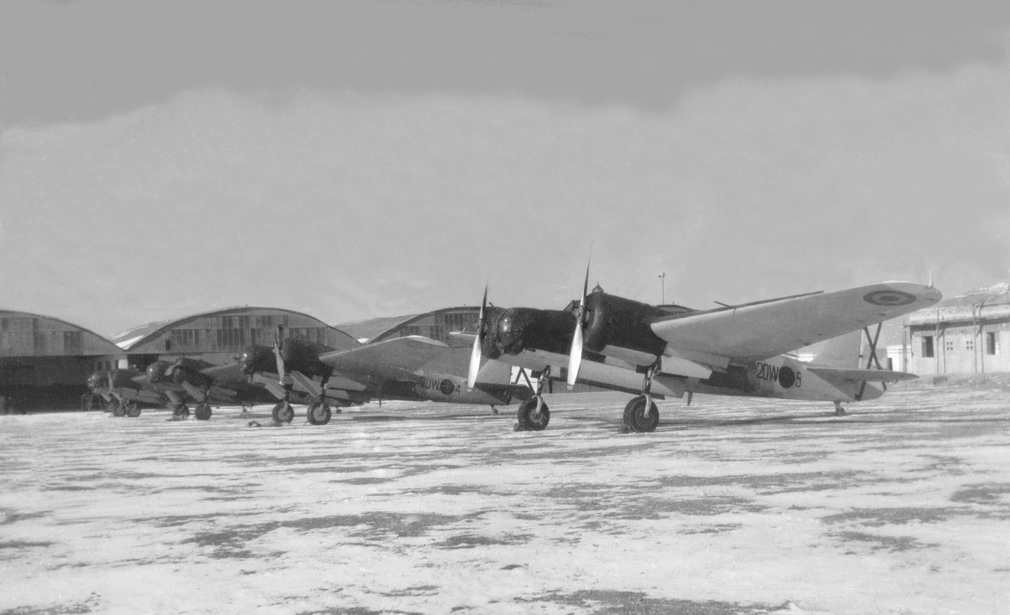 Tupolev SB "Katiuska" del Ala 14 en tierra, año 1940.